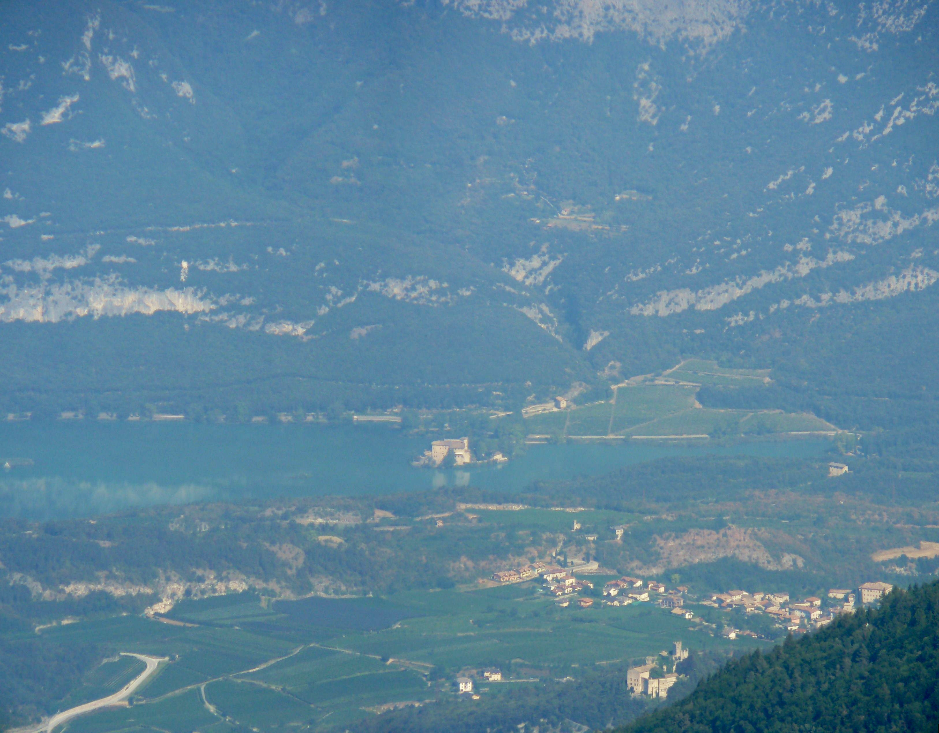 Lago di Toblino dal Bondone